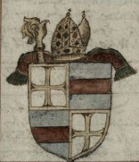 Wappen des Lübecker Bischofs Johannes VIII. Grimholt aus der Rehbein-Chronik